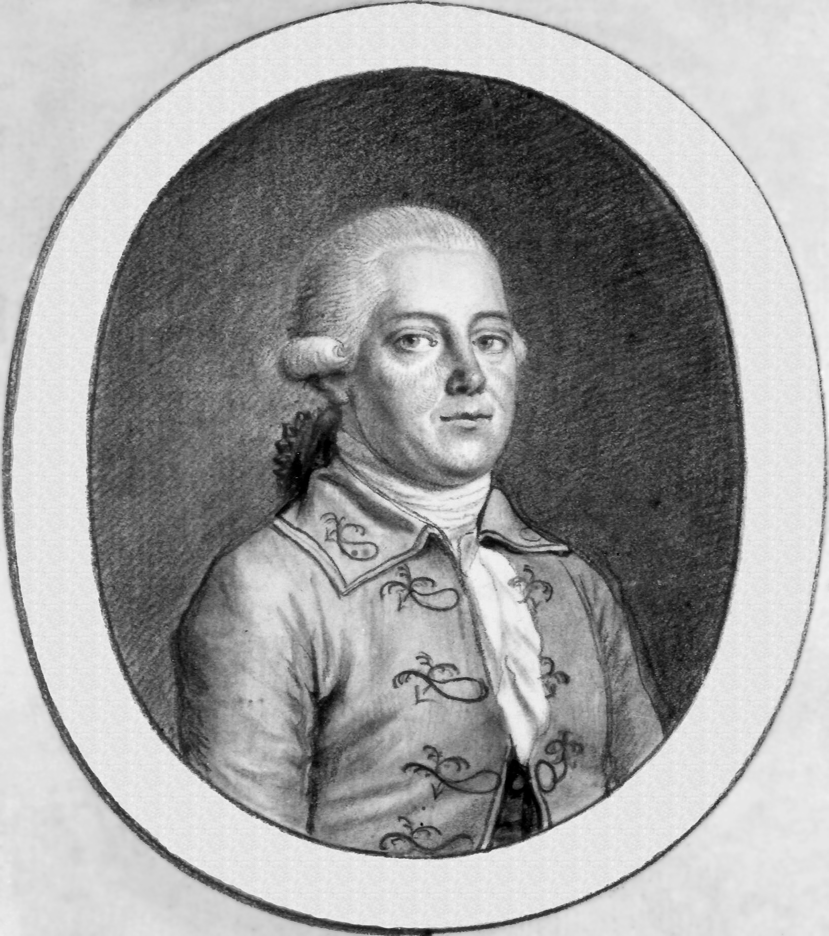 Hendrik van Wijn (1740-1831)